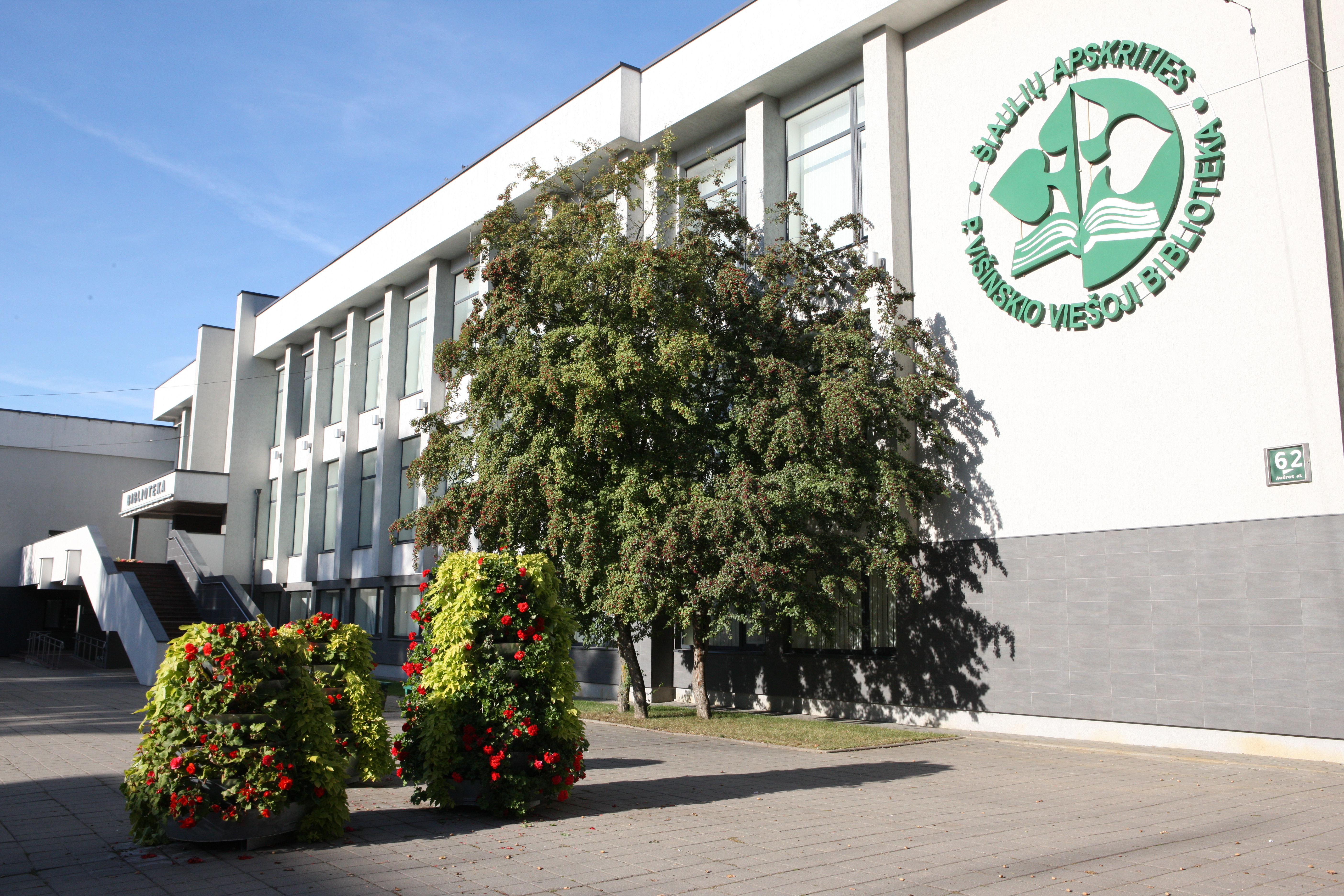 Bibliotekos pastatas. Ievos Slonksnytės nuotr.